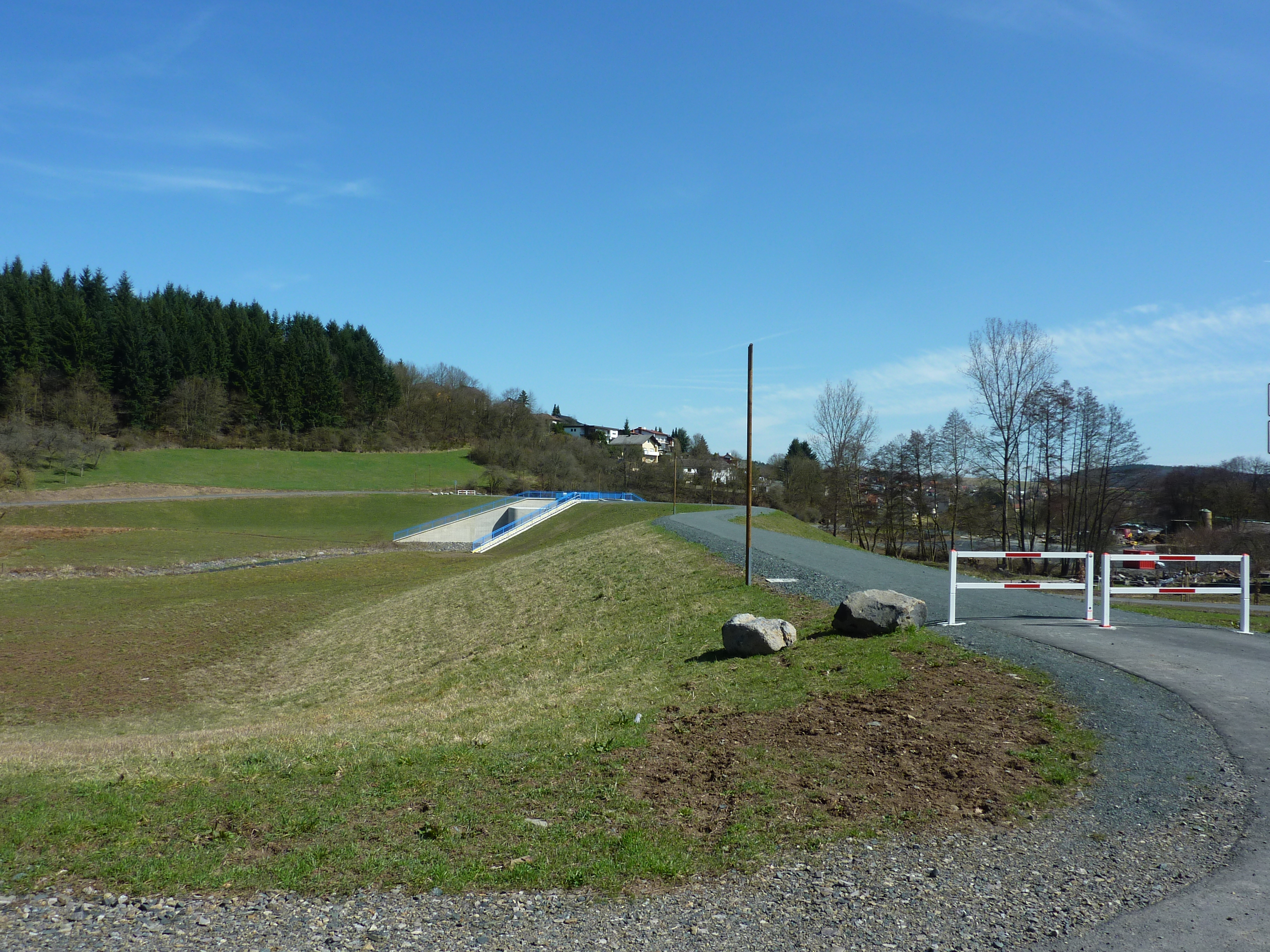 Salzböde-Hochwassersperrwerk "Waldmühle" Gladenbach-Weidenhausen